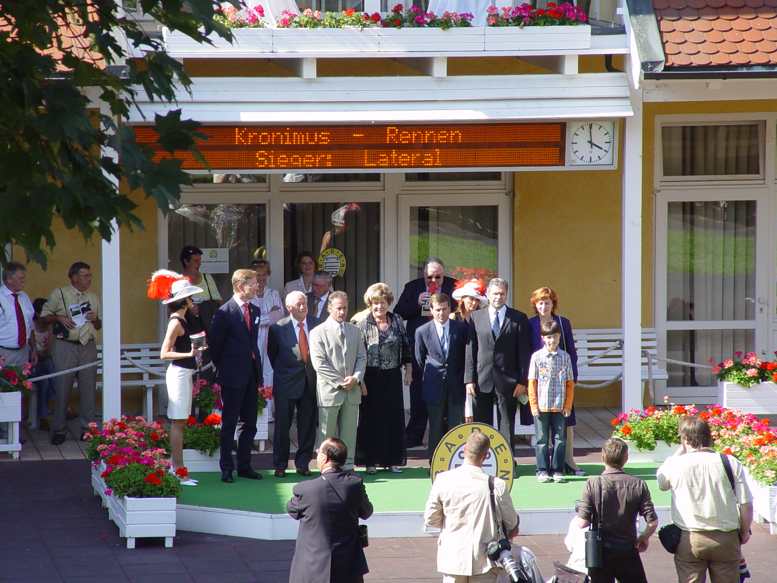 Die Siegerehrung nach dem Kronimus-Rennen 2005 vor der Waage auf dem Iffezheimer Rennplatz.